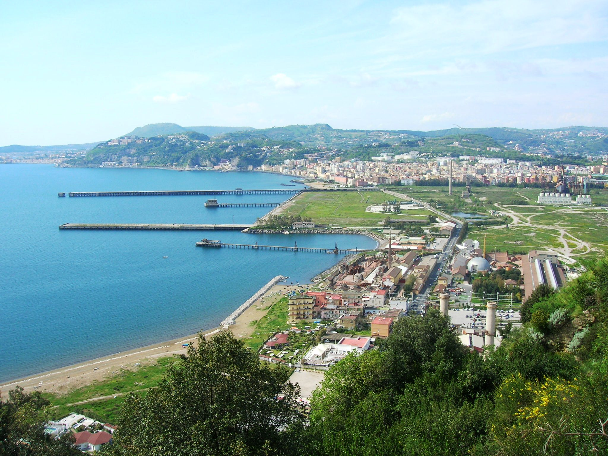 L'area dell'ex Italsider di Bagnoli